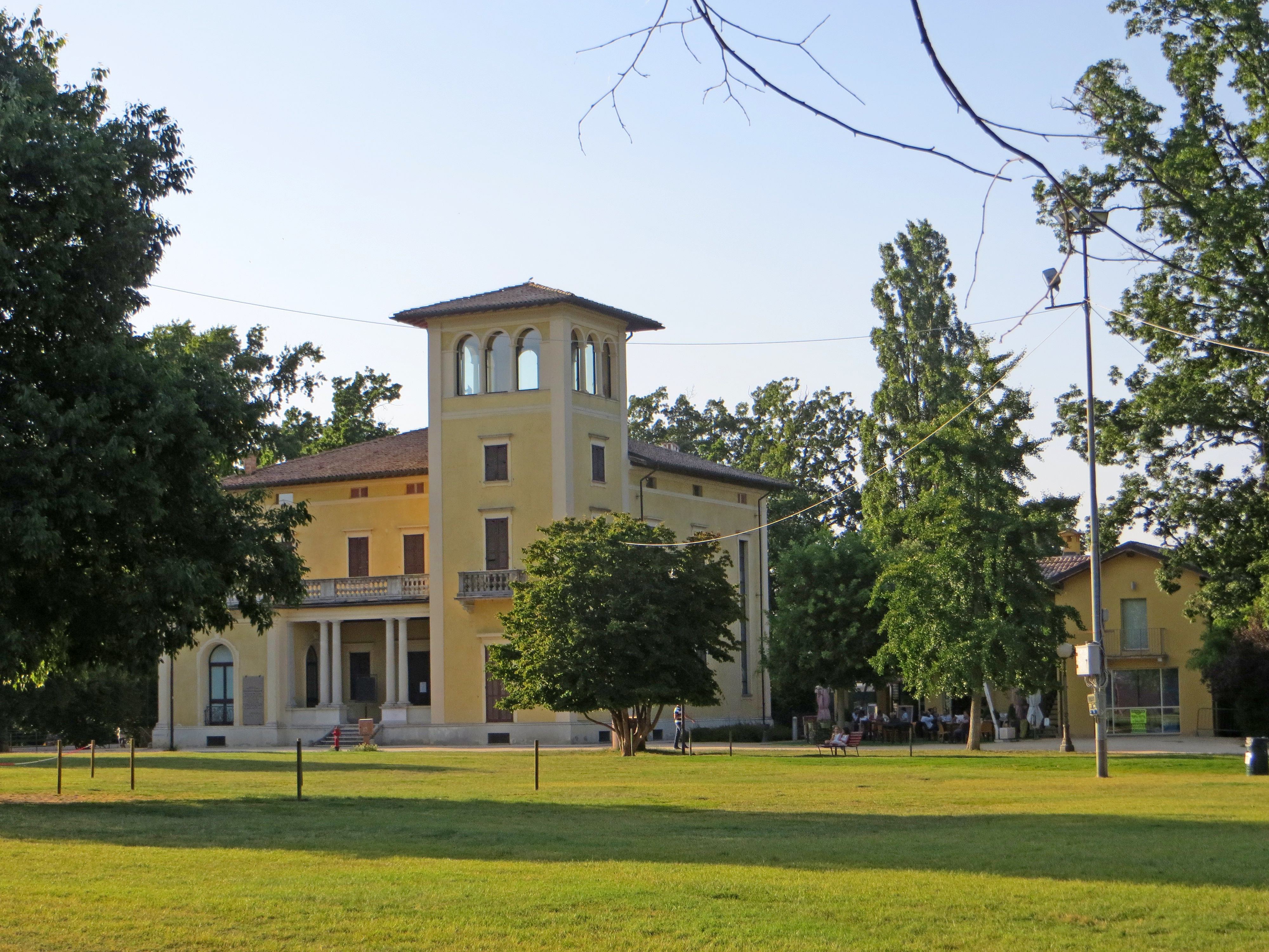 Villa Soragna (Collecchio) - facciata e lato sud